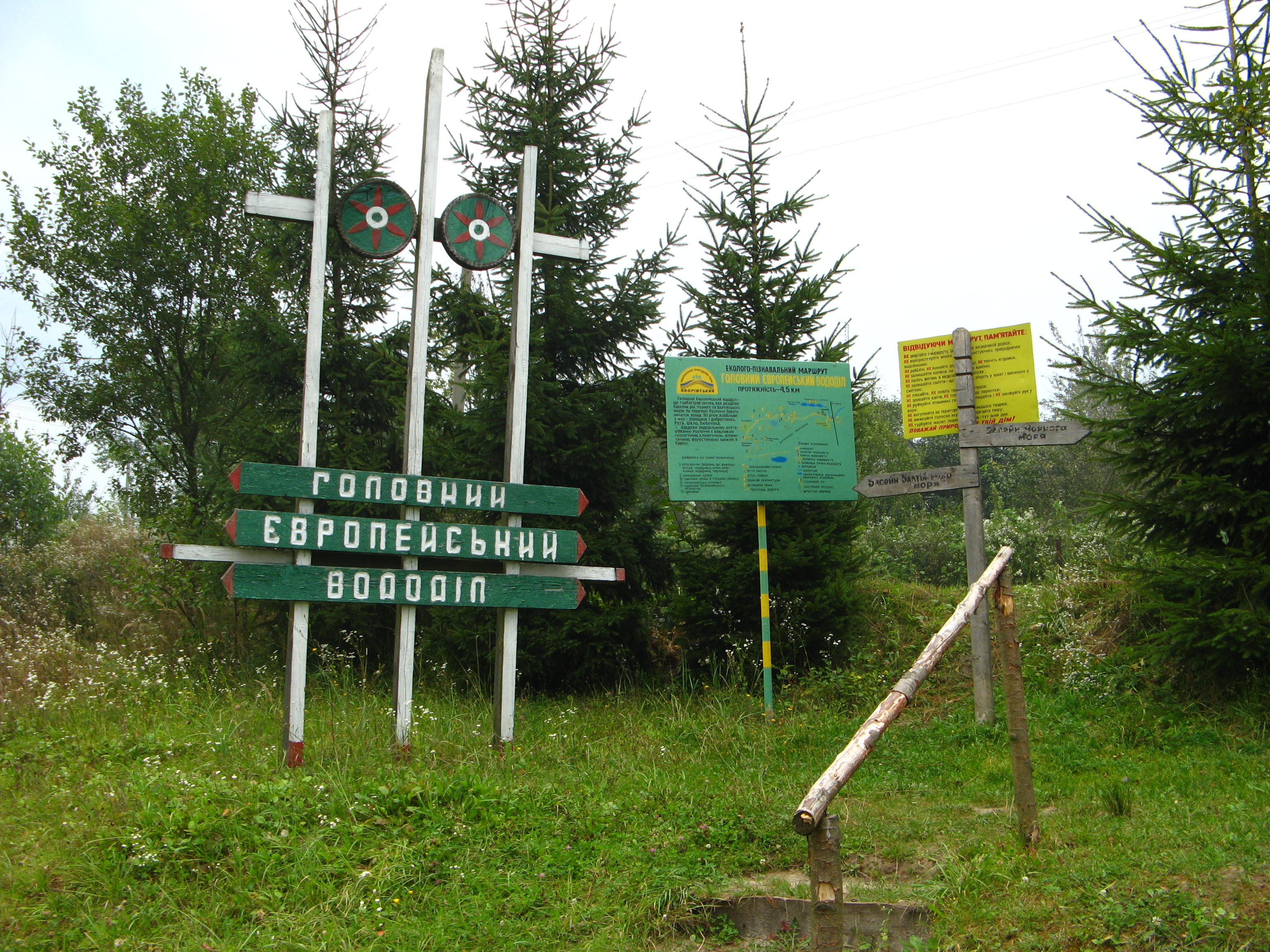 Вододіл